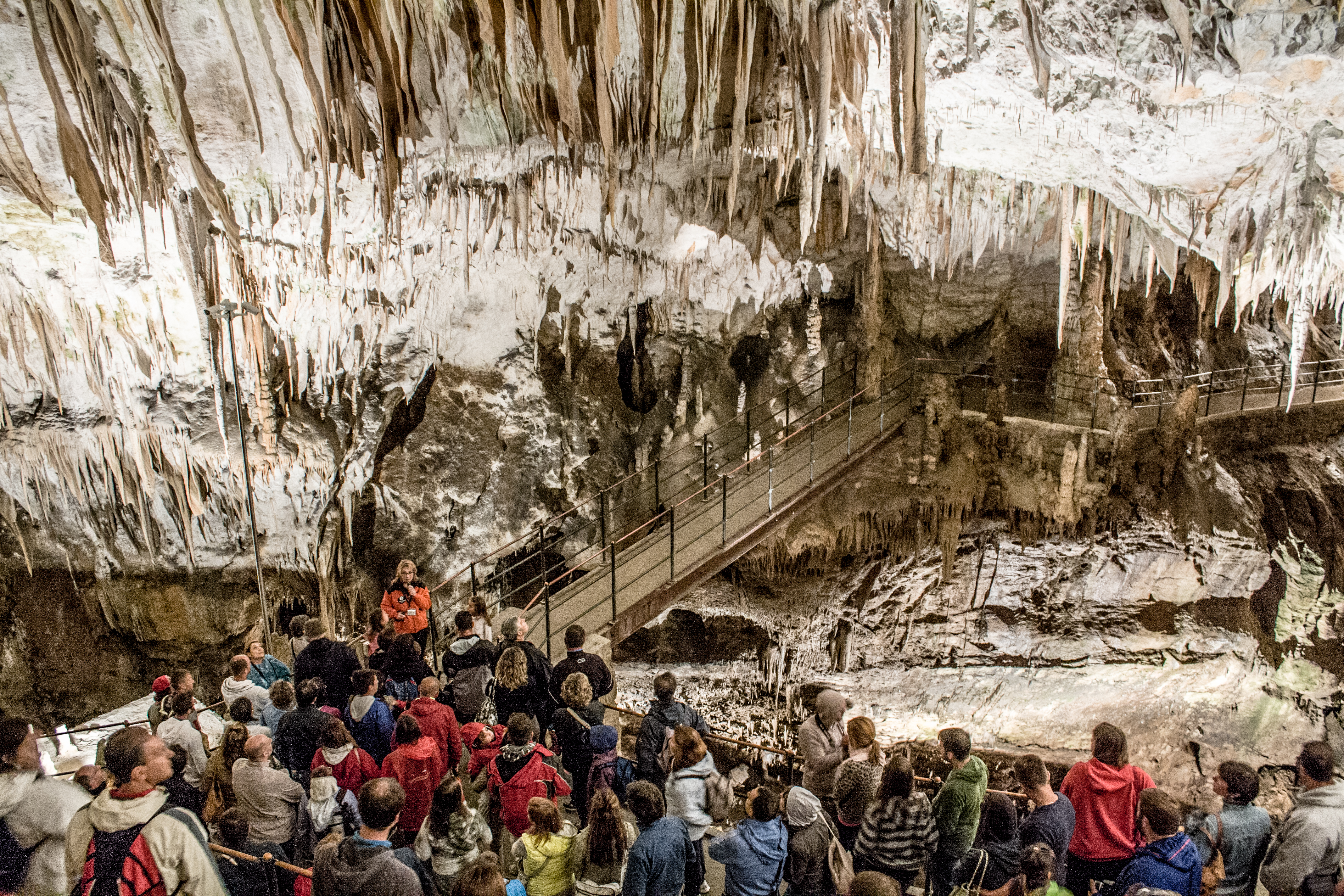 Postojna Cave